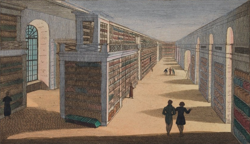 Der Rittersaal des Schlosses Hohentübinngen als Bibliothek-Saal der Universität. Lithographie. Schefold 9459a.